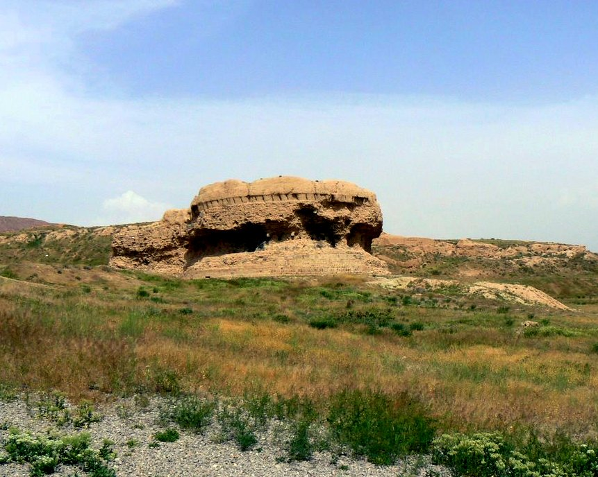 مجموعه ربع رشیدی تبریز